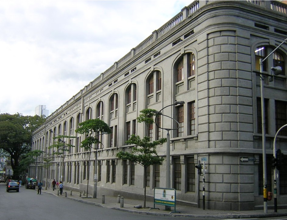 Claustro San Ignacio. Medellín, Colombia.